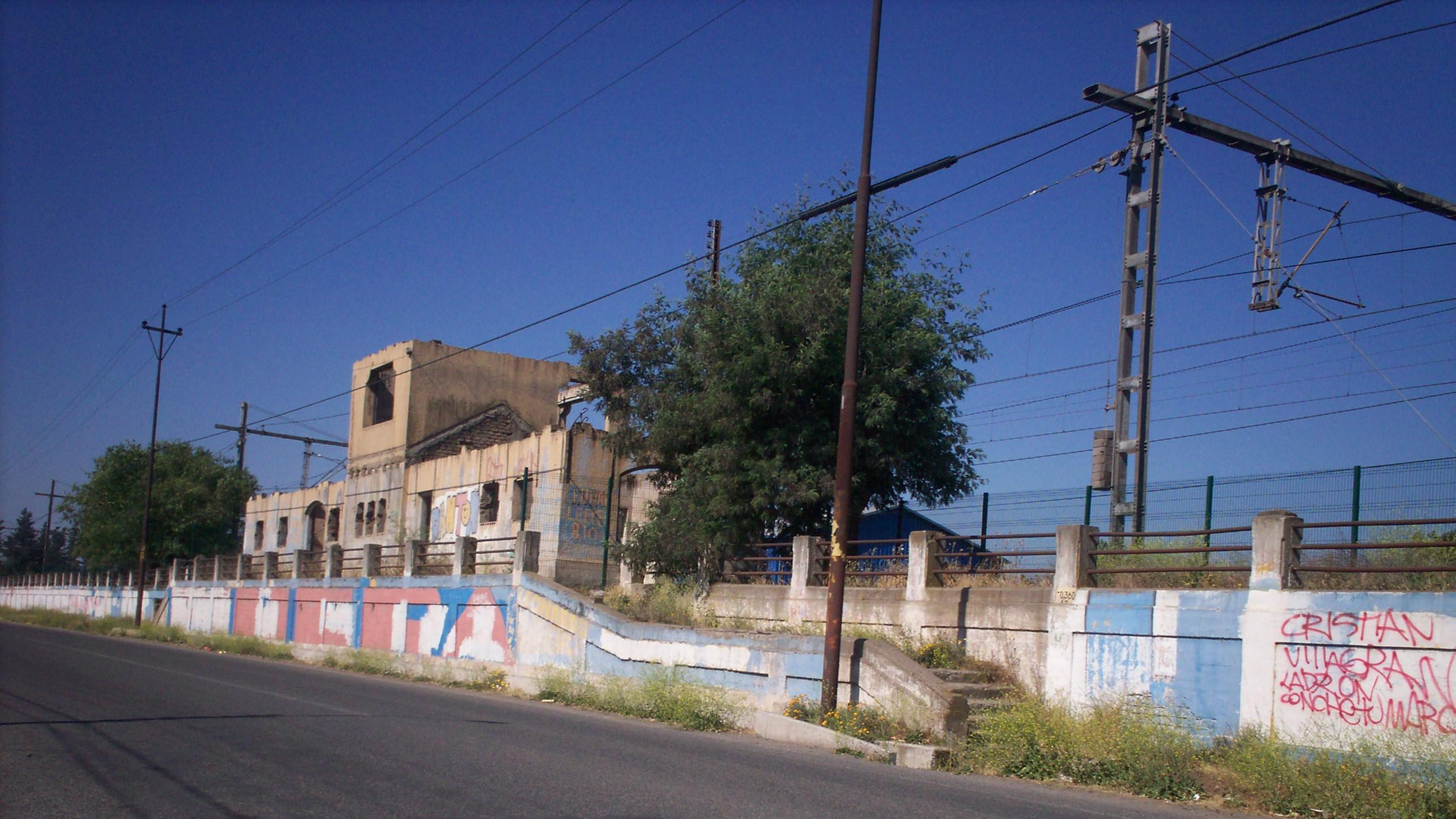 Estación Los Lirios, Los Lirios, Requínoa, Chile